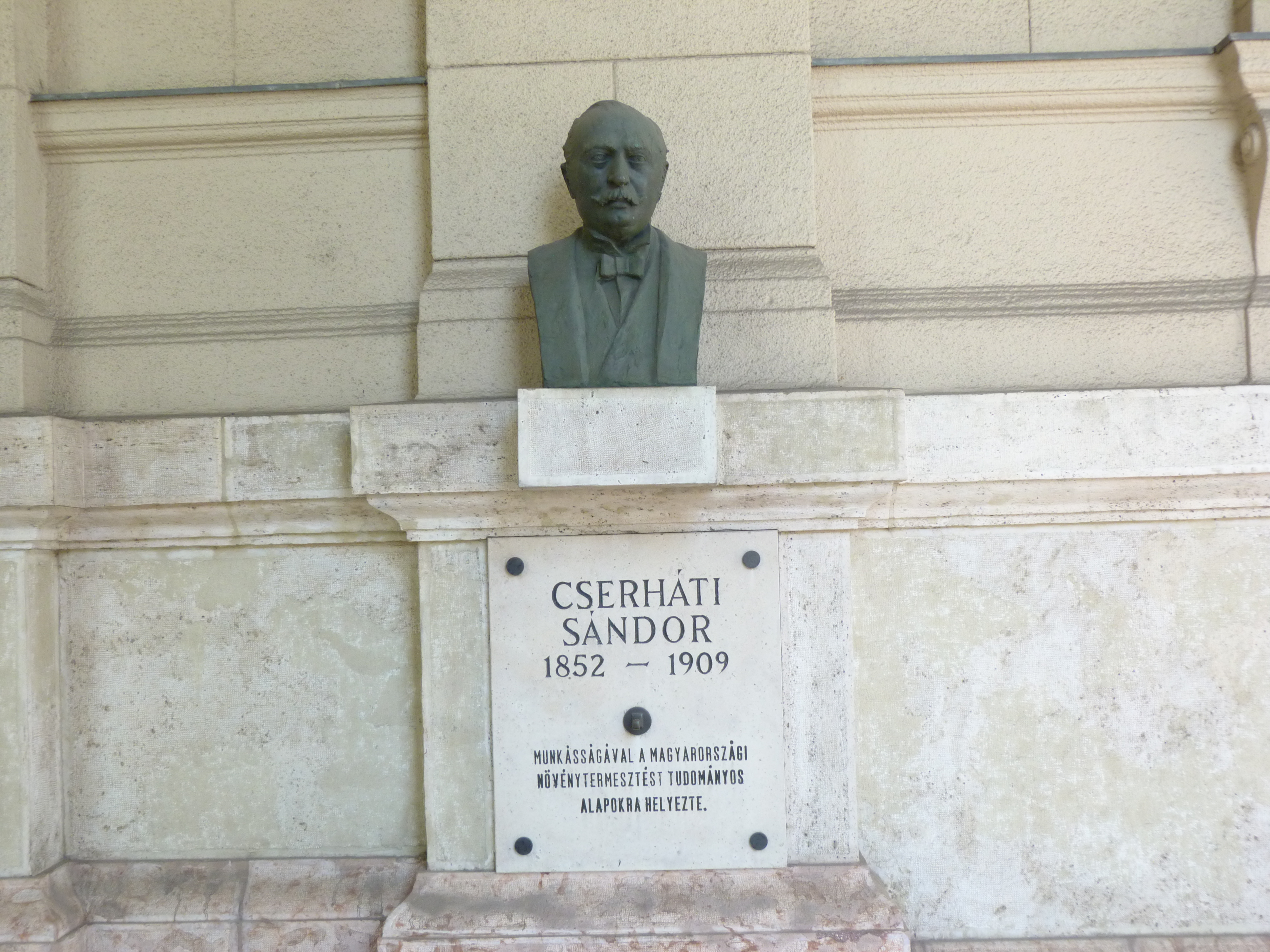 A felvétel 2012. május 19 -én készült Budapesten a Kossuth téren. A Mezőgazdasági és Vidékfejlesztési Minisztérium falánál Cserháti Sándor szobra.